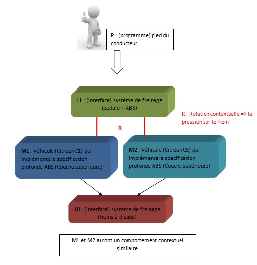 Illustration de l'indépendance d'implémentation